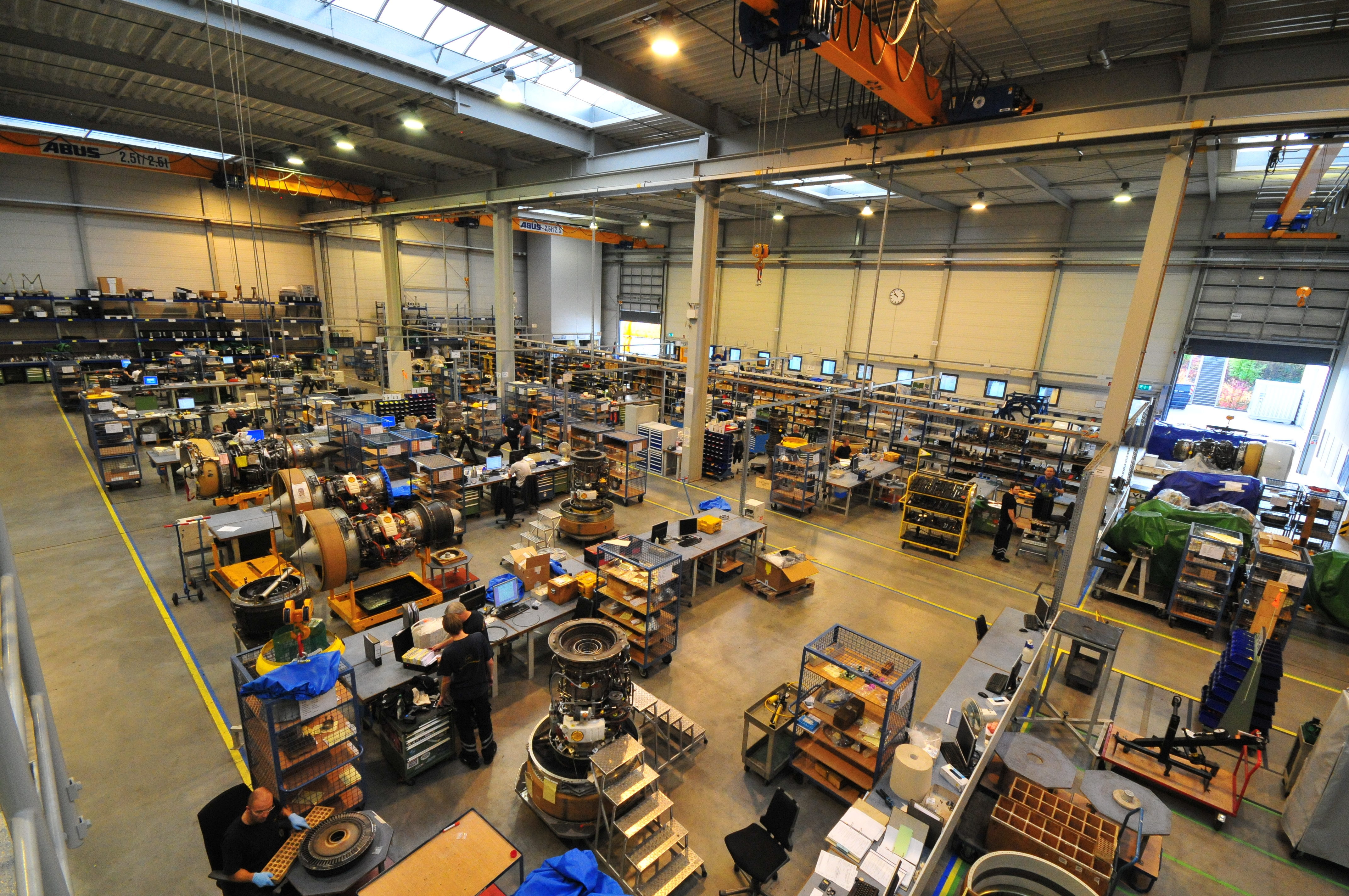 Produktionshalle Lufthansa Technik AERO Alzey